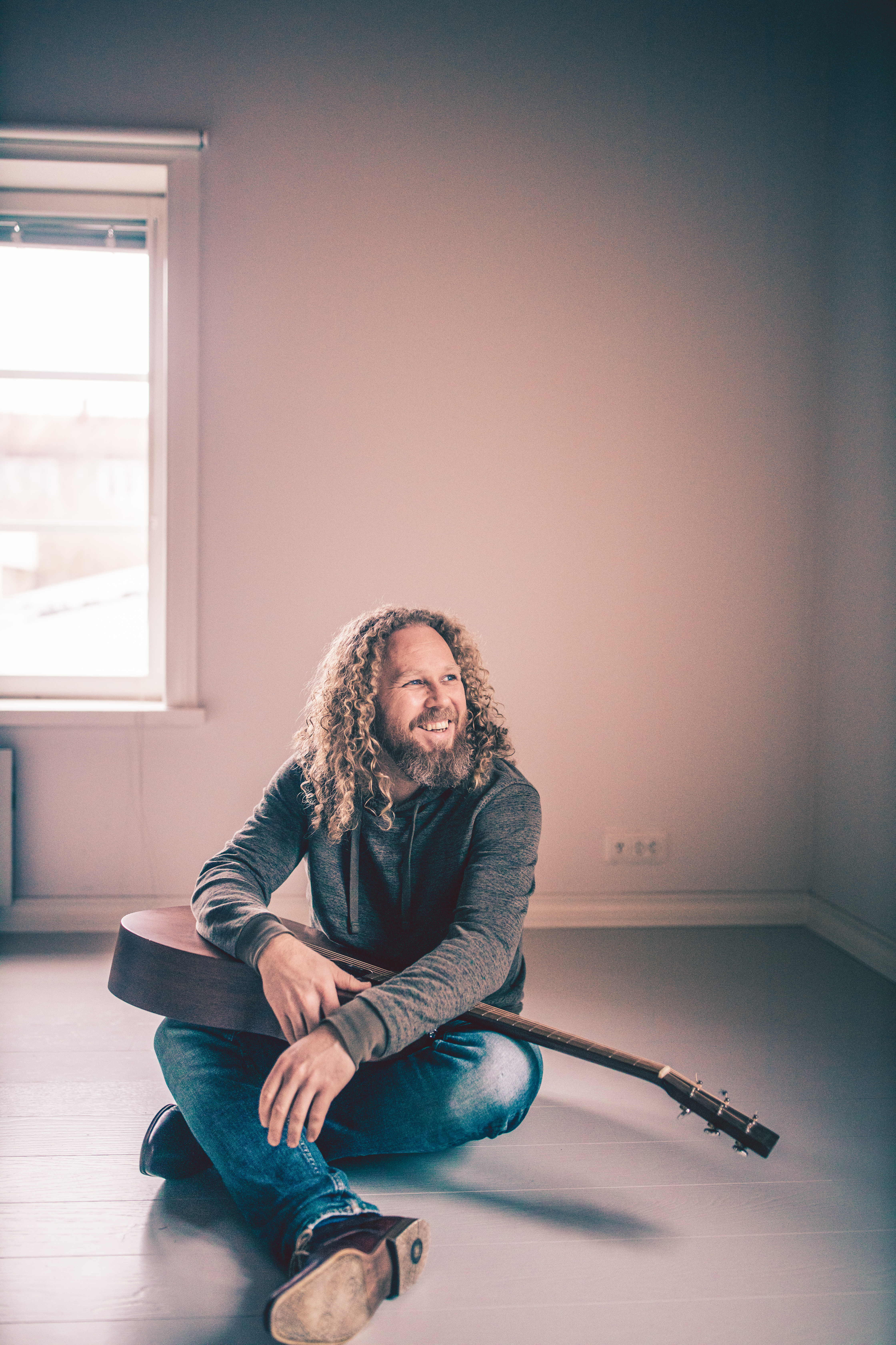 Toivo Susi - Vapaita lintuja